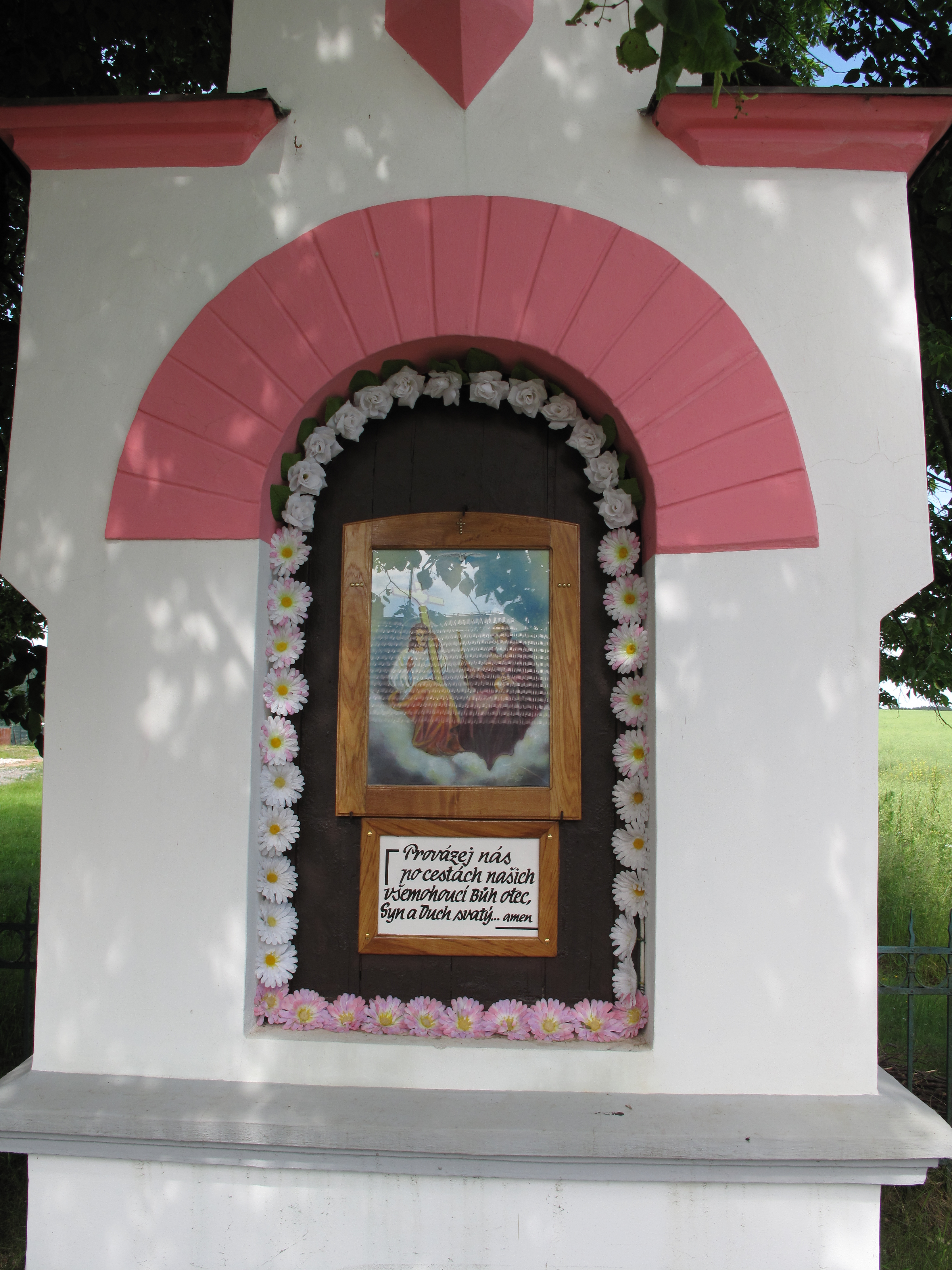 Boží muka v Přibyšicích. Okres Benešov, Česká republika.